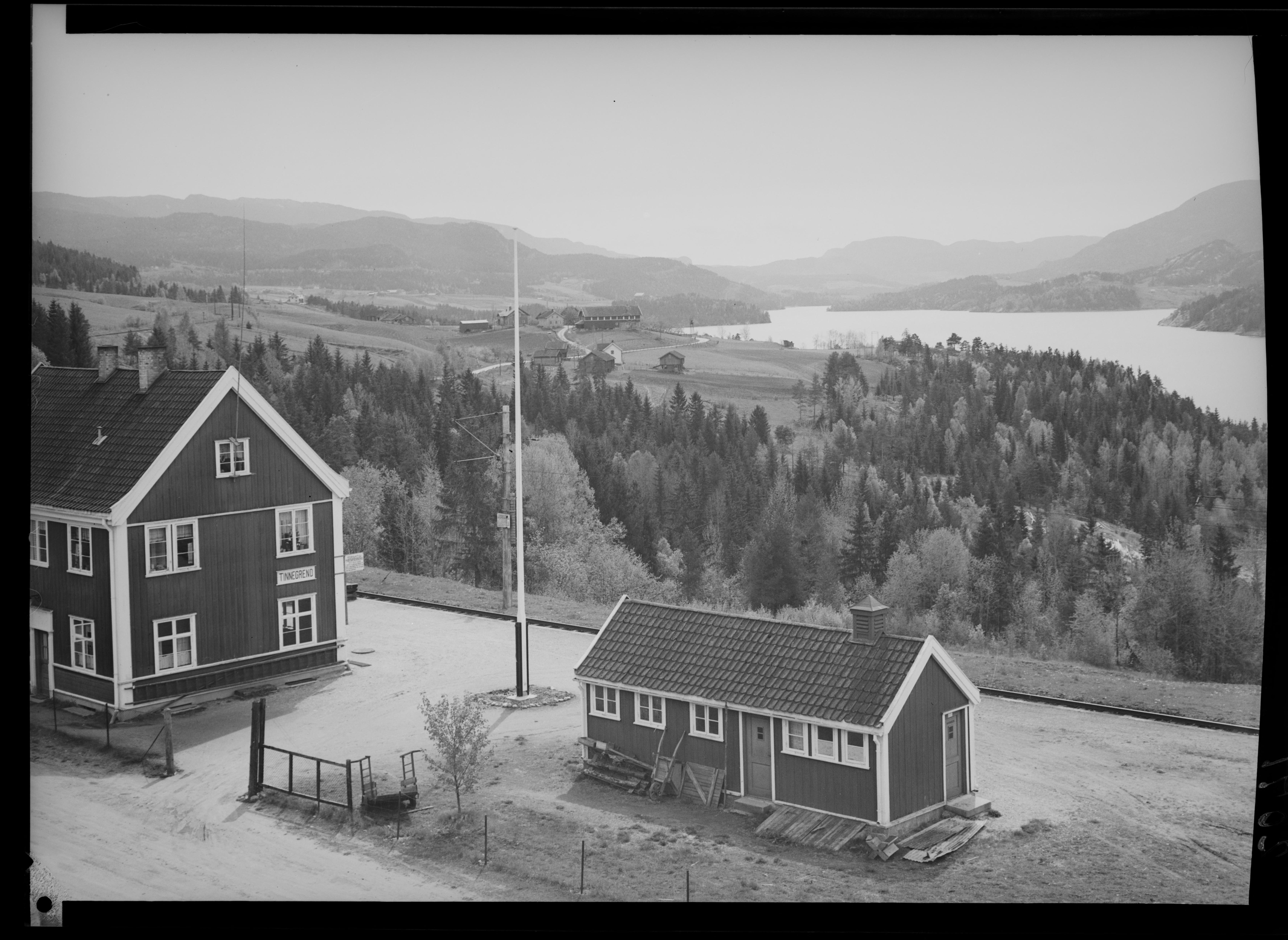 Bildet er hentet fra Nasjonalbibliotekets bildesamling. Anmerkninger til bildet var: Fotograf:Ukjent Heddalsvatnet,Tinnegrend, Notodden, Telemark